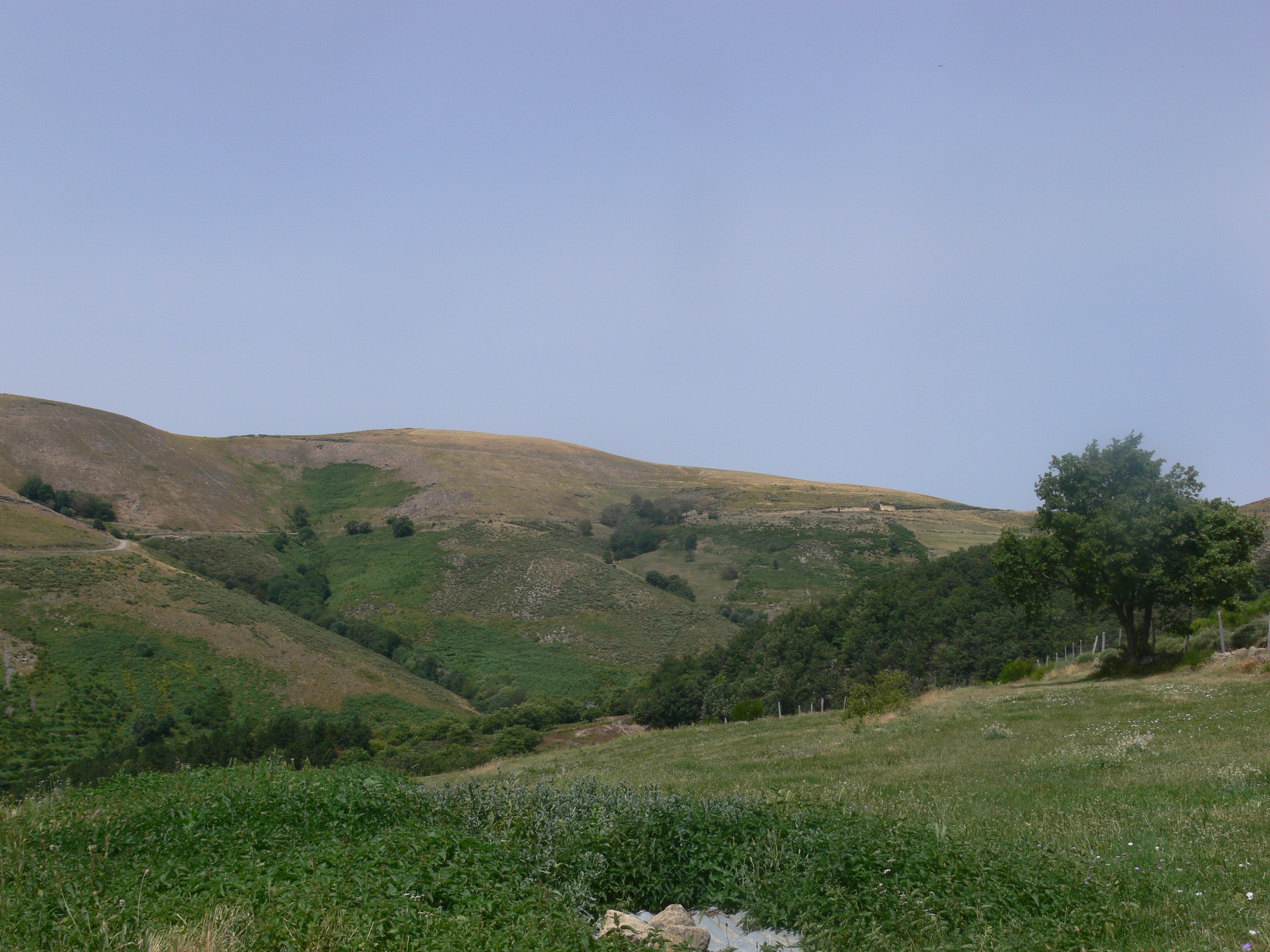 Issamoulenc